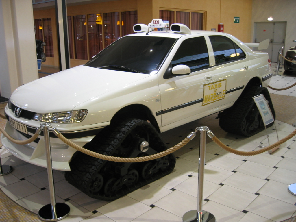 Taxi 406 Marseille du film Taxi 3 de Luc Besson au musée Peugeot de Montbeliard